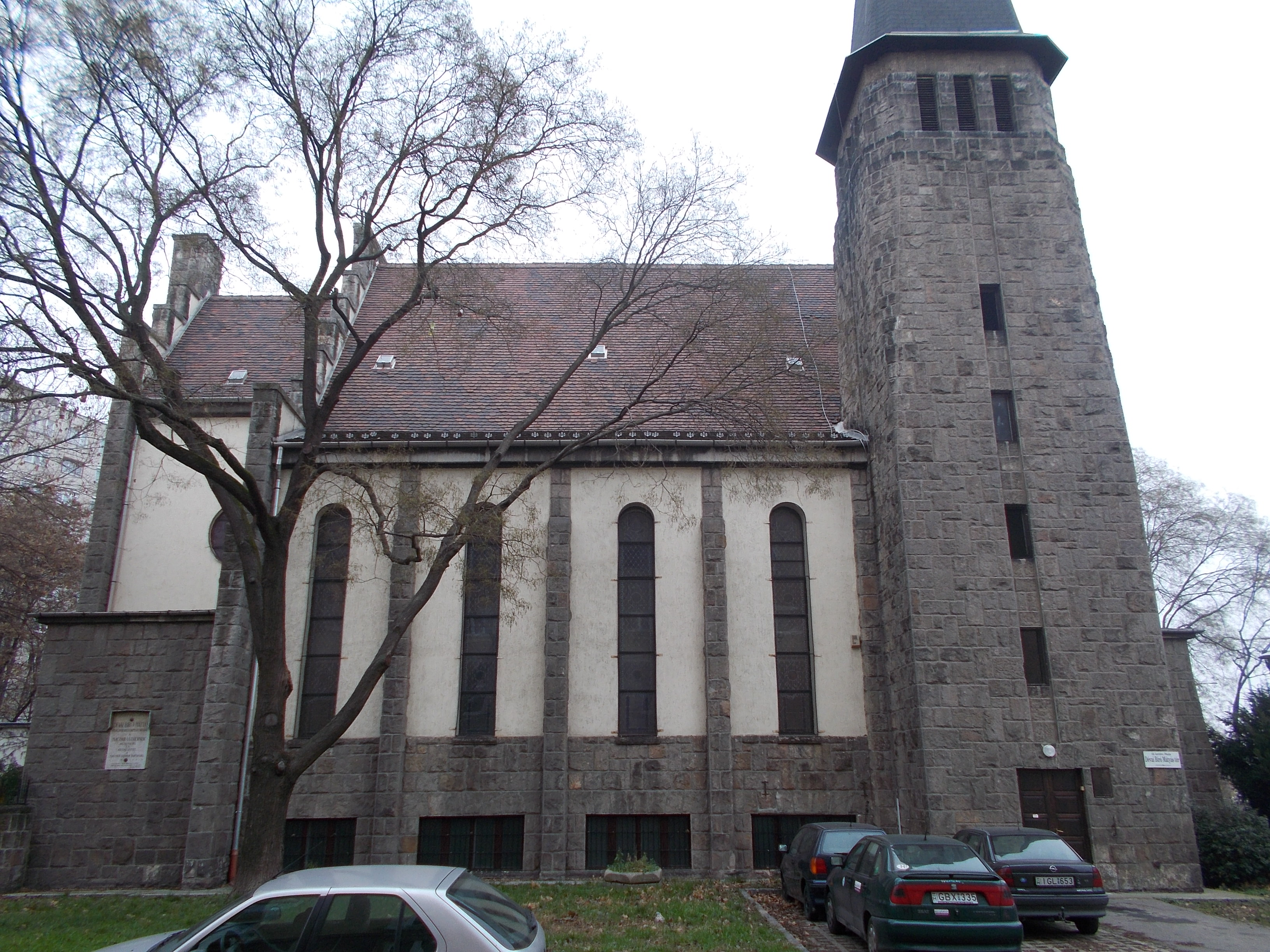 Evangelikus templom és paplak. Műemléki azonosító: 333. Friedrich Lóránt építész. Épült 1935-1936.- Magyarország, Budapest, III. kerület, Dévai Bíró Mátyás tér 28., Pacsirtamező utca 23., Dévai Bíró Mátyás tér 23. This is a photo of a monument in Hungary, Identifier: 333